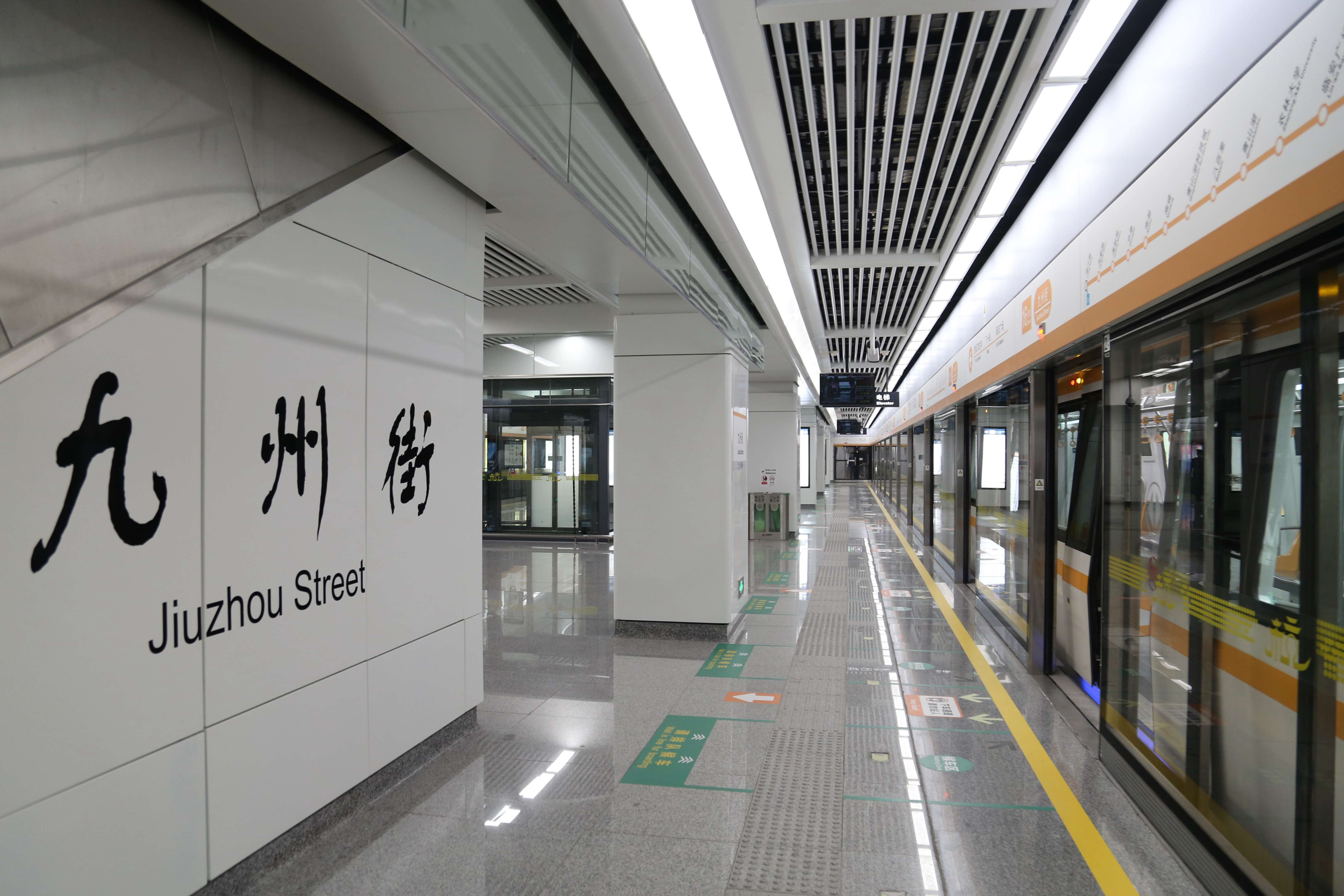 九州街站站台与大字壁